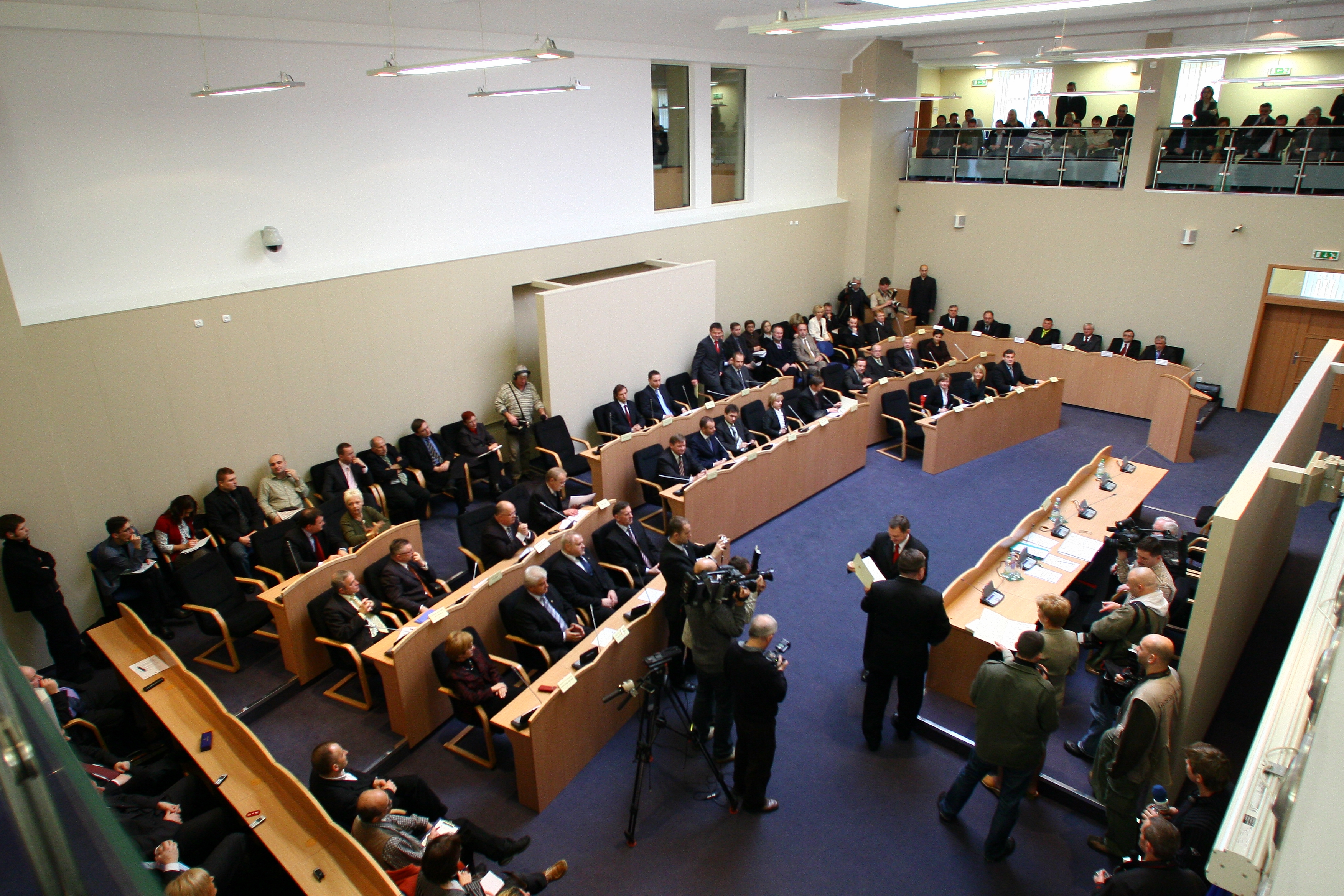 Pierwsza sesja III kadencji Sejmiku Województwa Zachodniopomorskiego odbyła się 27 listopada 2006 roku. Zaprzysiężenie na radnego odbiera Władysław Husejko, przyszły marszałek województwa.